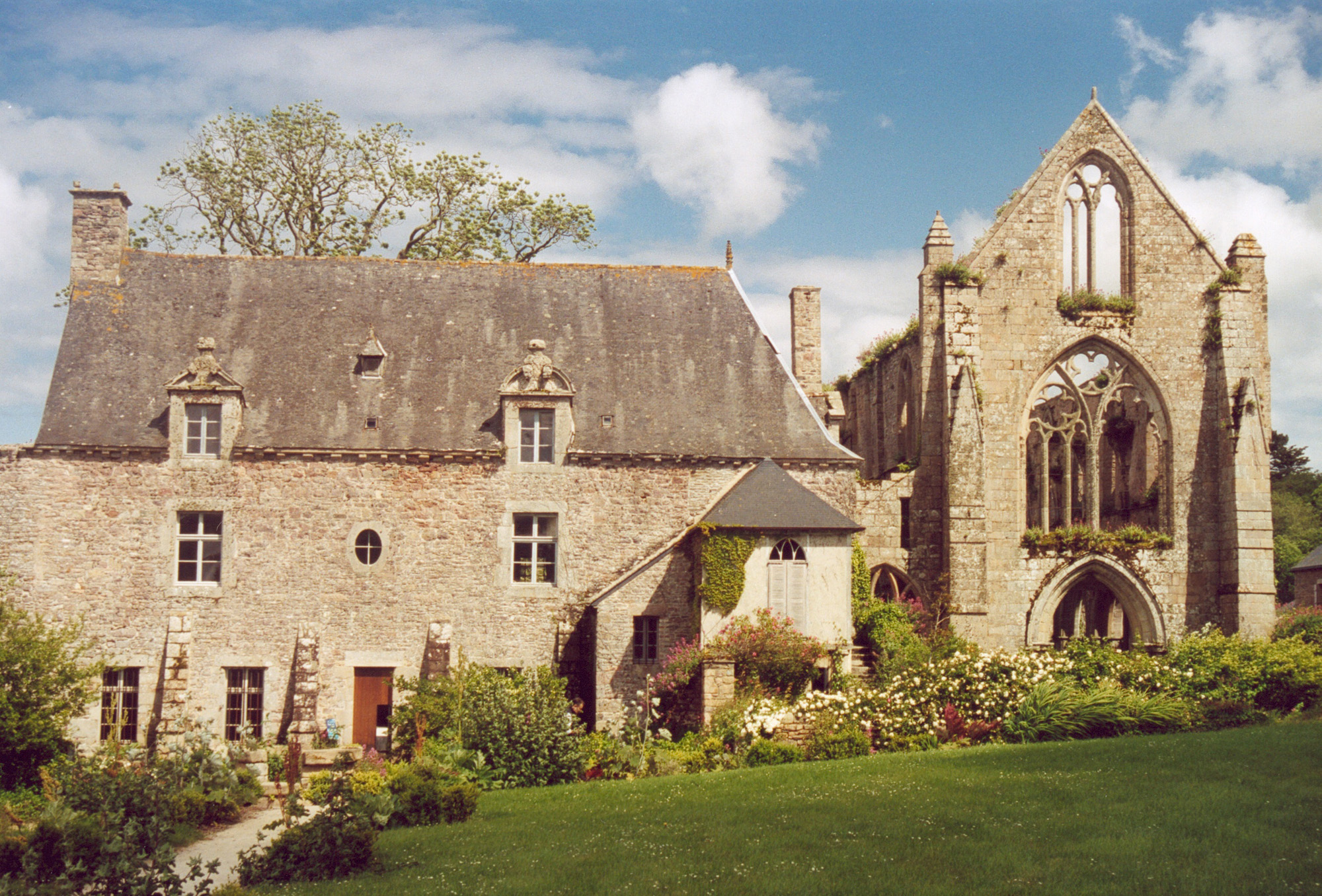 Bretagne Kérity Abbaye de Beauport Auteur : GIRAUD Patrick